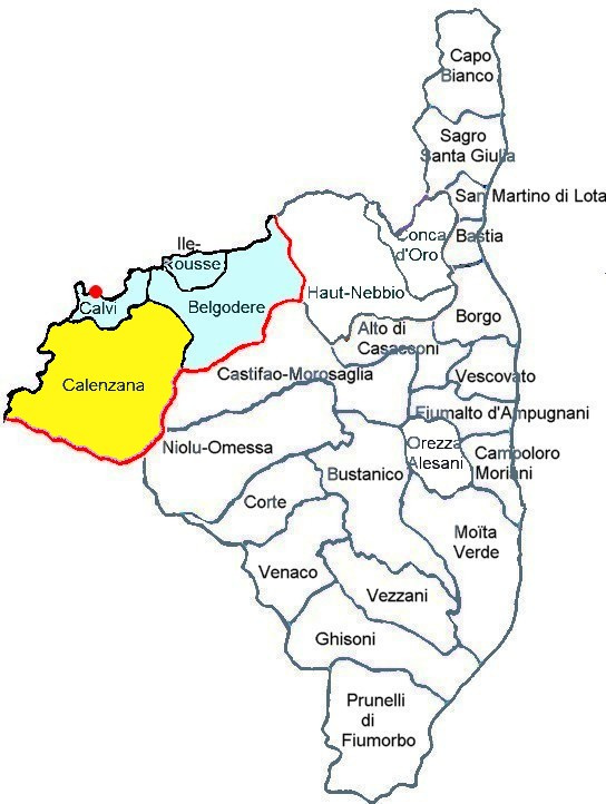 Localisation du canton de Calenzana, Balagna, Haute-Corse